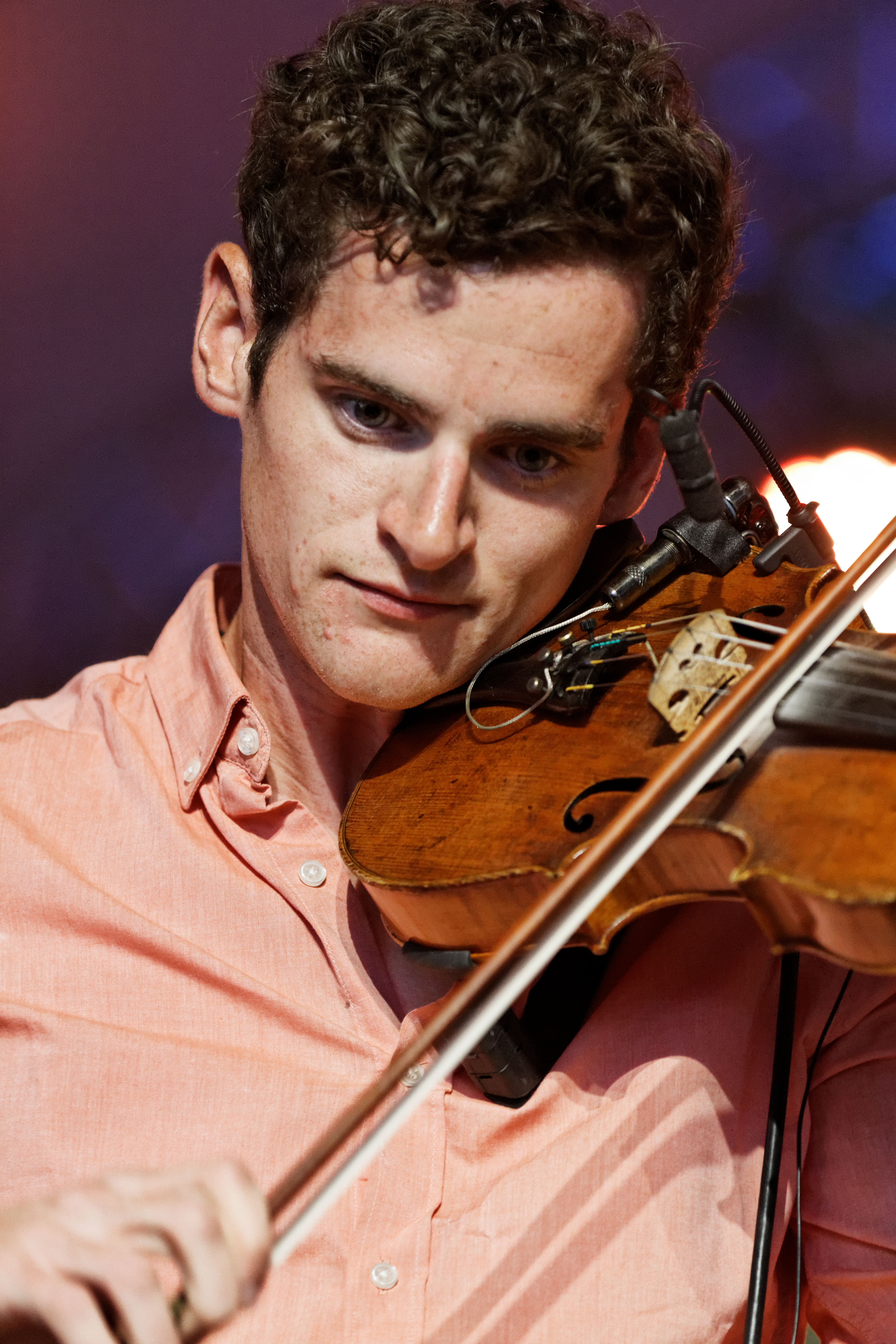 Mànran en concert à l'espace évêché lors du festival de Cornouaille 2013.